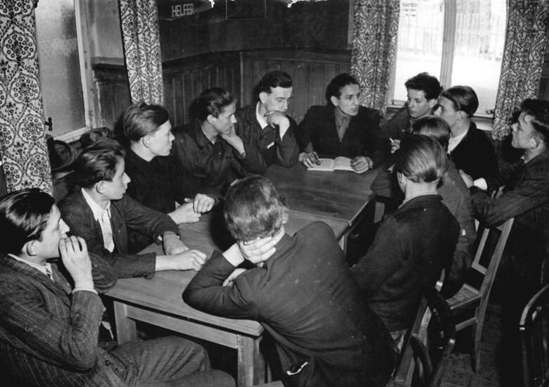 Oelsnitz, Jugenddorf, Besprechung Illus Kiesl. 4.5.1951 Hilfe für den Steinkohlenbergbau (Das Jugenddorf Ölsnitz). Ein Schwerpunkt unseres Fünfjahrplans ist der Steinkohlenbergbau. Bisher war es nicht möglich, den Produktionsplan bei der Steinkohle voll zu erfüllen. Darum meldete sich im Februar 1951 die Jugendbrigade "Werner Thoma" vom Talsperrenbau Granzahl freiwillig zur Arbeit in das Zwickau-Ölsnitzer Steinkohlenrevier. Gleichzeitig forderten die Mitglieder der Brigade alle Jugendlichen der Republik auf, ihrem Beispiel zu folgen und den Beruf des Bergmanns zu erlernen. Bisher leben 230 junge Kumpel aus allen Ländern der DDR im neu errichteten Jugenddorf Ölsnitz. UBz: Unter der Leitung des jungen Kumpels Kaczmarek, der seine Norm mit 137% erfüllt, eignen sich die "Neuen" das notwendige theoretische Wissen an. Am 1.5.1951 wurde dieses Jugenddorf als "Alfred Baumann" Jugendstadt eingeweiht.